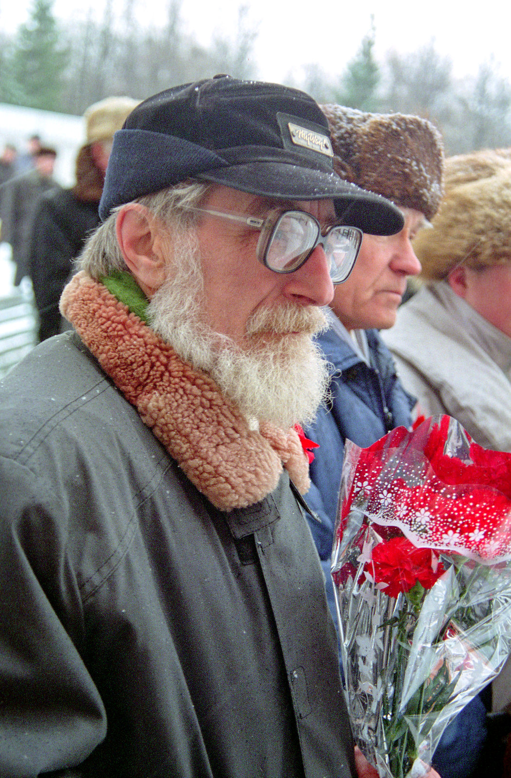 7 ноября 1997 года на Красной площади в Переславле протоиерей Андрей Кульков отпел панихиду на могиле военного комиссара С. А. Петрова и сотрудника переславского уездного комитета ВКП(б) И. П. Кусина. На этот памятный митинг пришёл Юрий Абрамович Первин (кто).